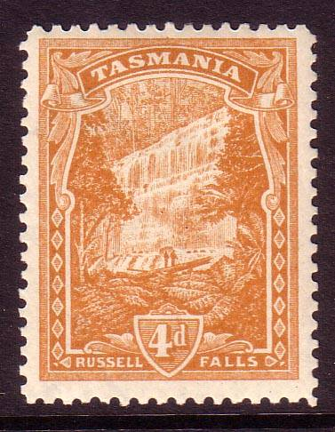 Un timbr e 1900.